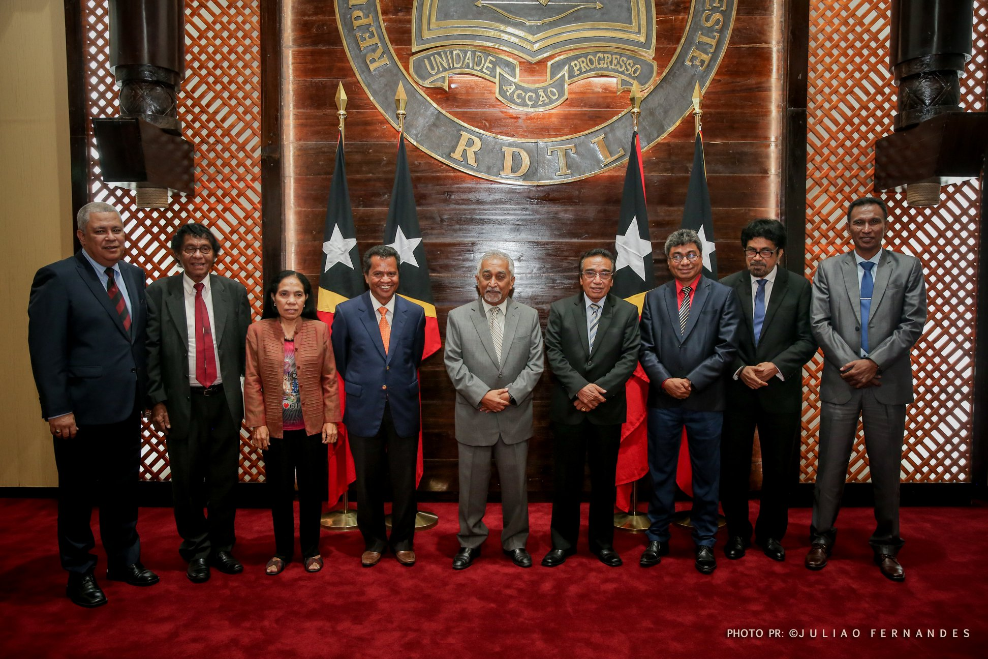 FRETILIN-Vertreter bei Francisco Guterres